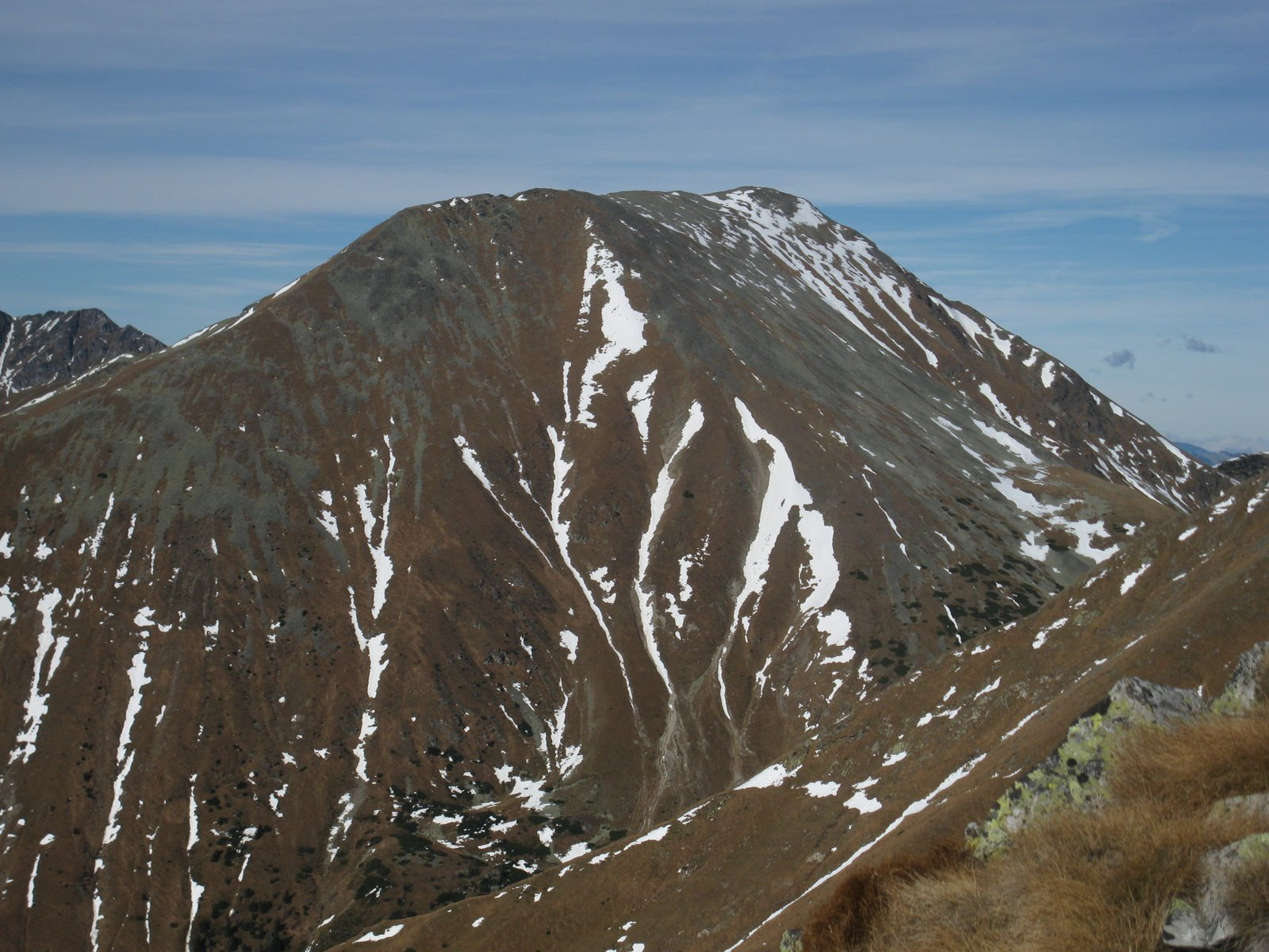 Hochreichhart